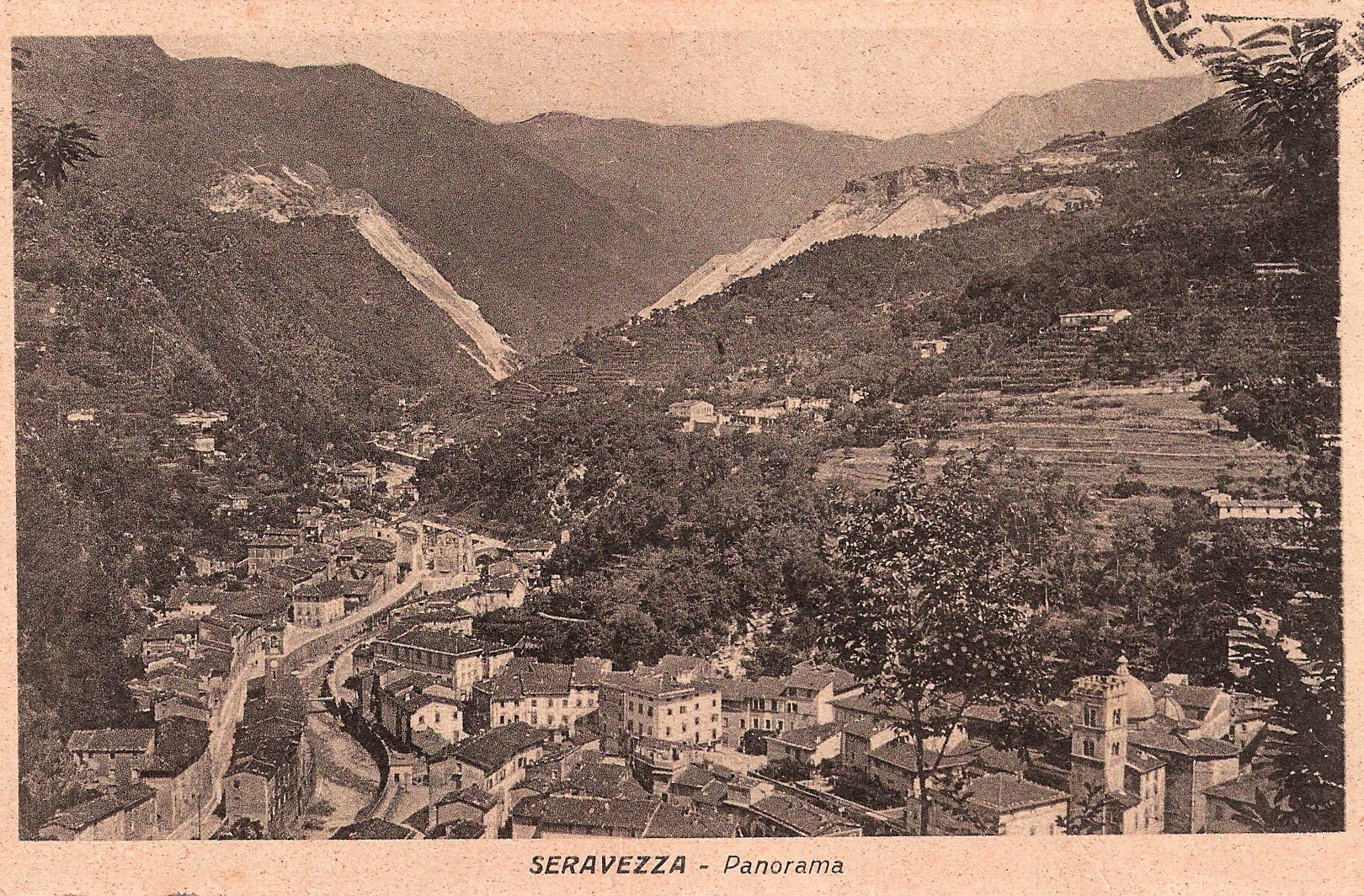 Serravezza panorama